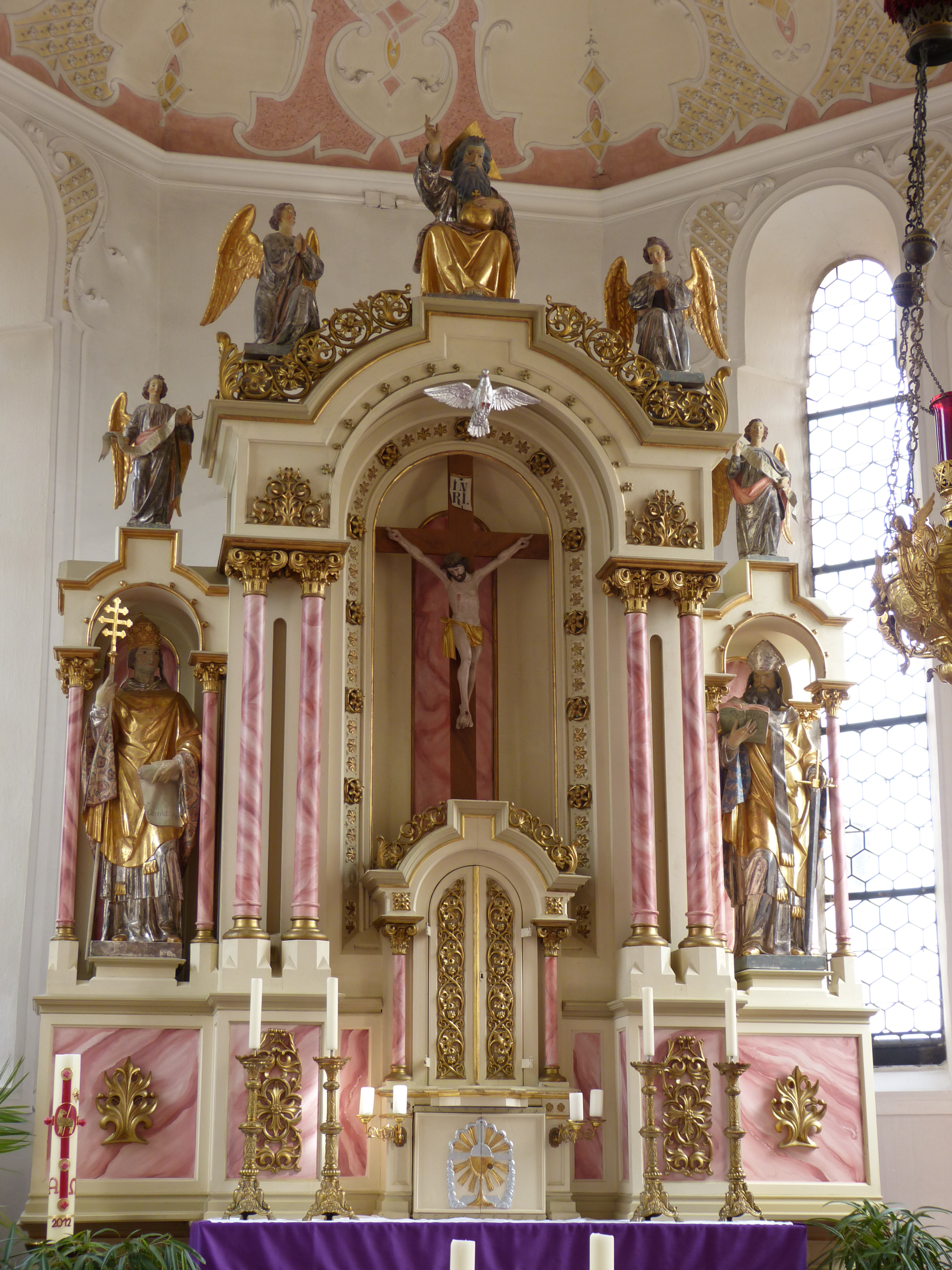 St. Cornelius und Cyprian, Probstried, Landkreis Oberallgäu, Bayern